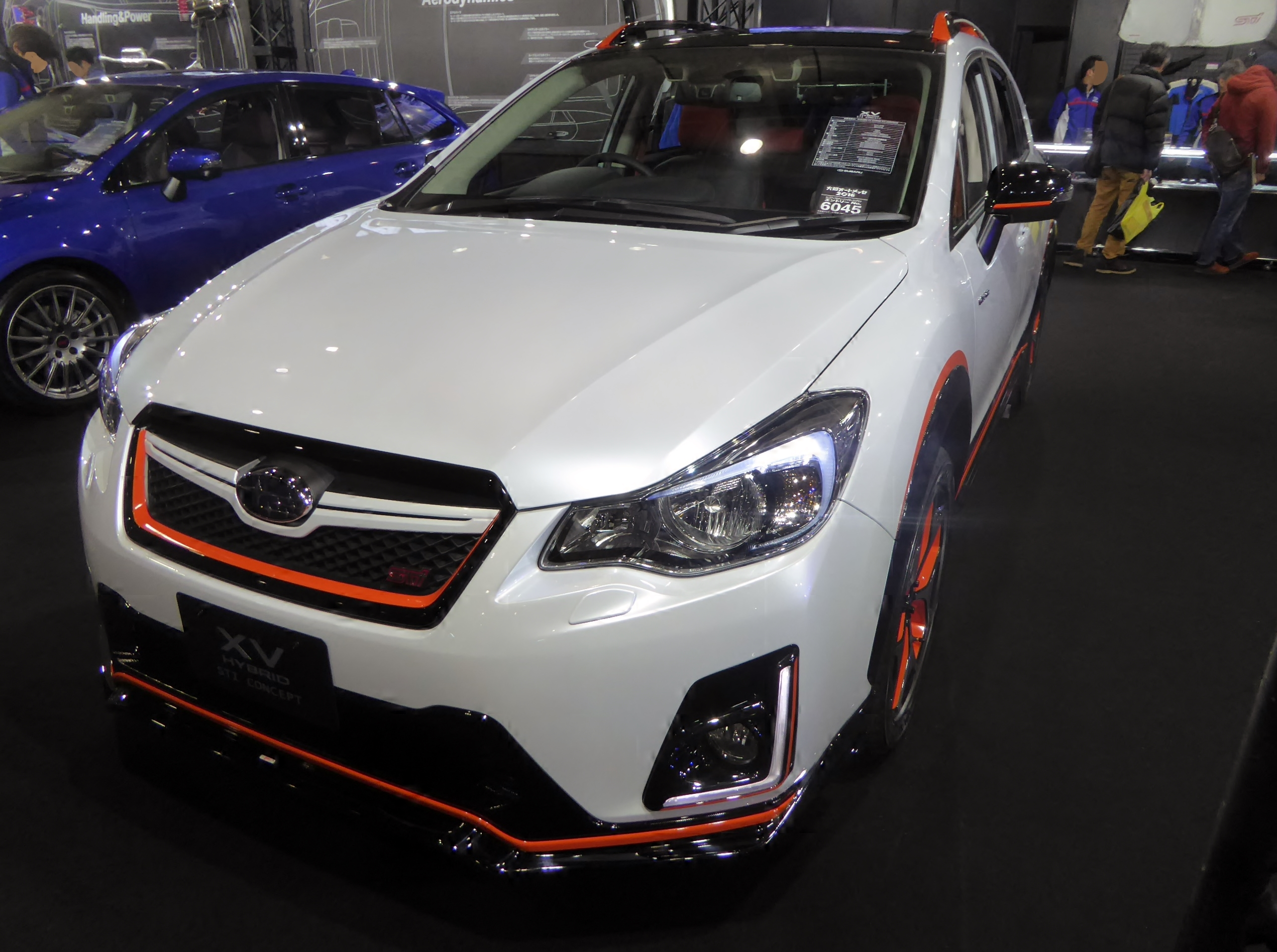 大阪オートメッセ2016においてスバル・レヴォーグXVハイブリッドSTIコンセプトを撮影。